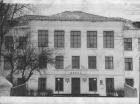 Нова школа 73